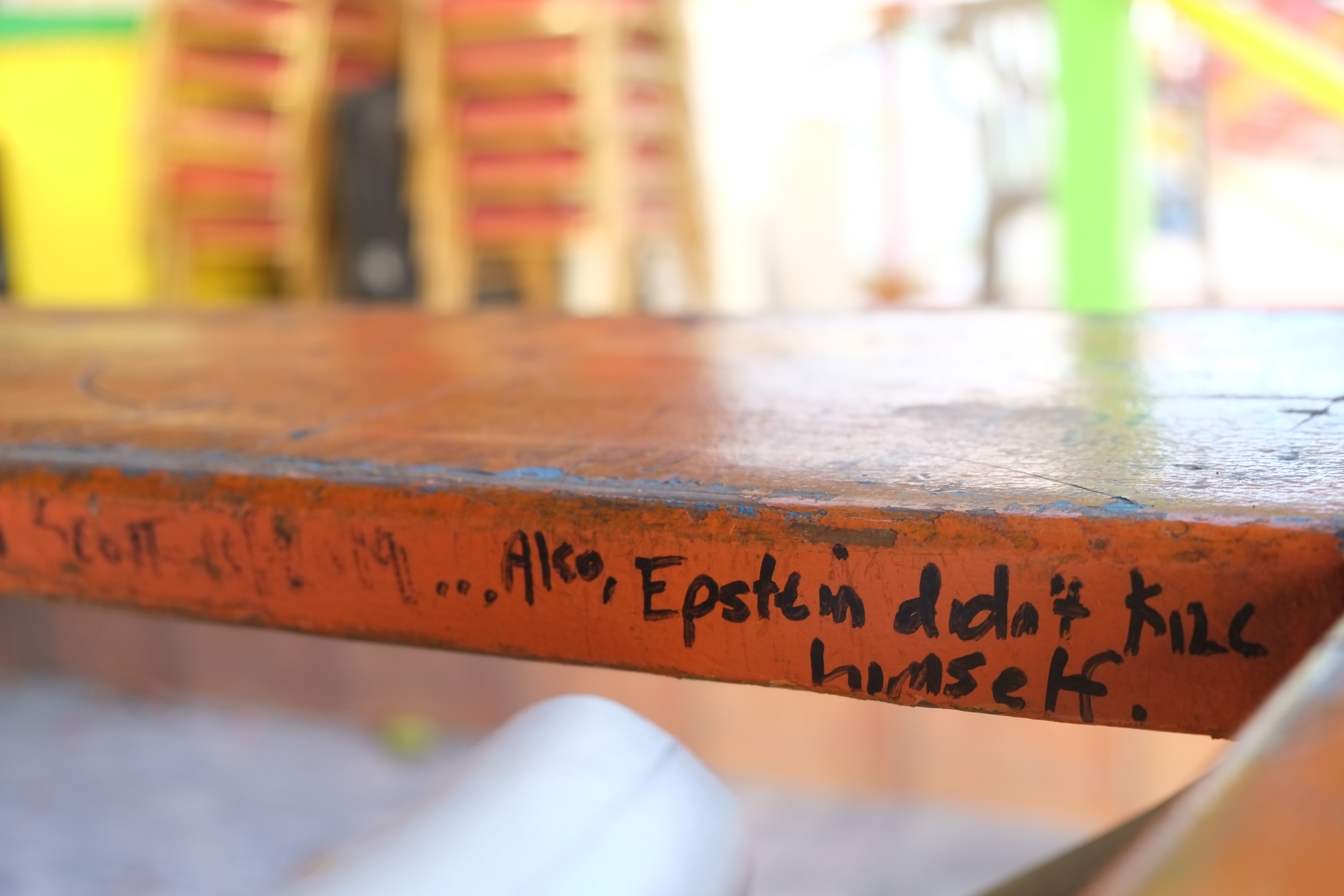 Also, Epstein didn't kill himself